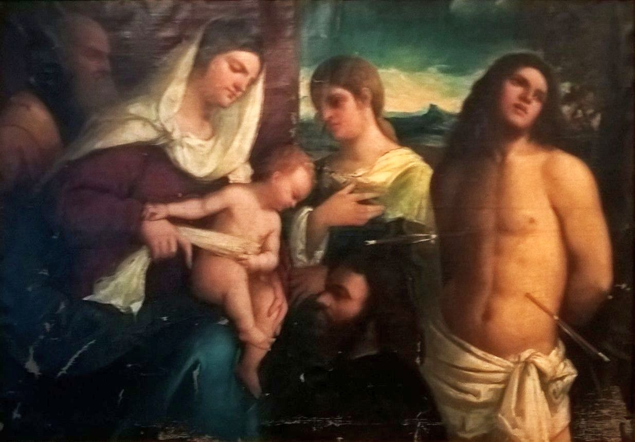 Sacra Conversazione - după Sebastiano del Piombo - tabloul se află astăzi la Muzeul Memorial "Nicolae Grigorescu" din Câmpina - România.